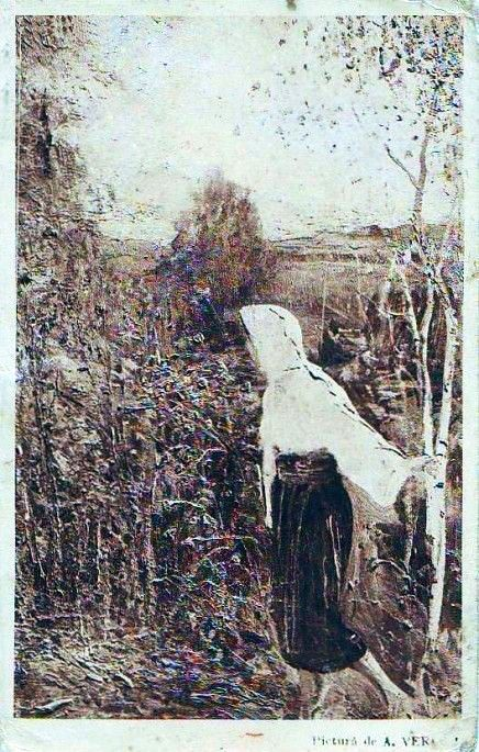 Port popular